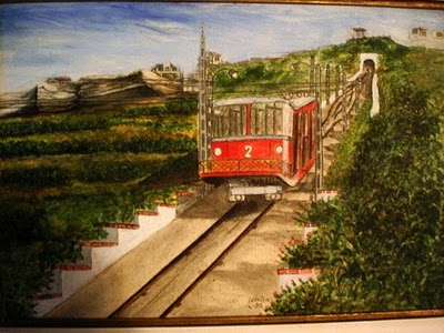 Pintura retratando o elevador ~1920.